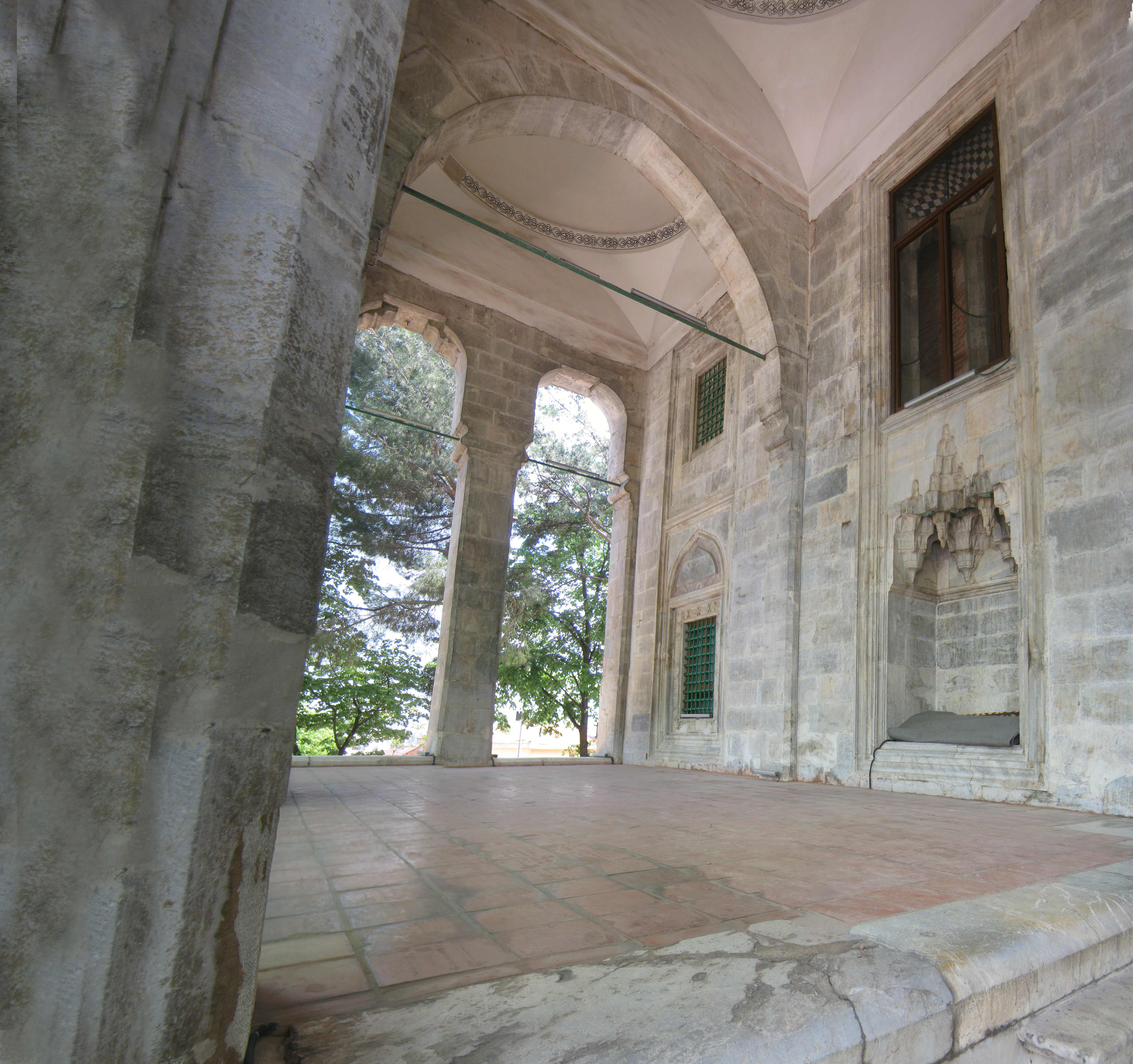 yıldırım bayezıd camii bursa